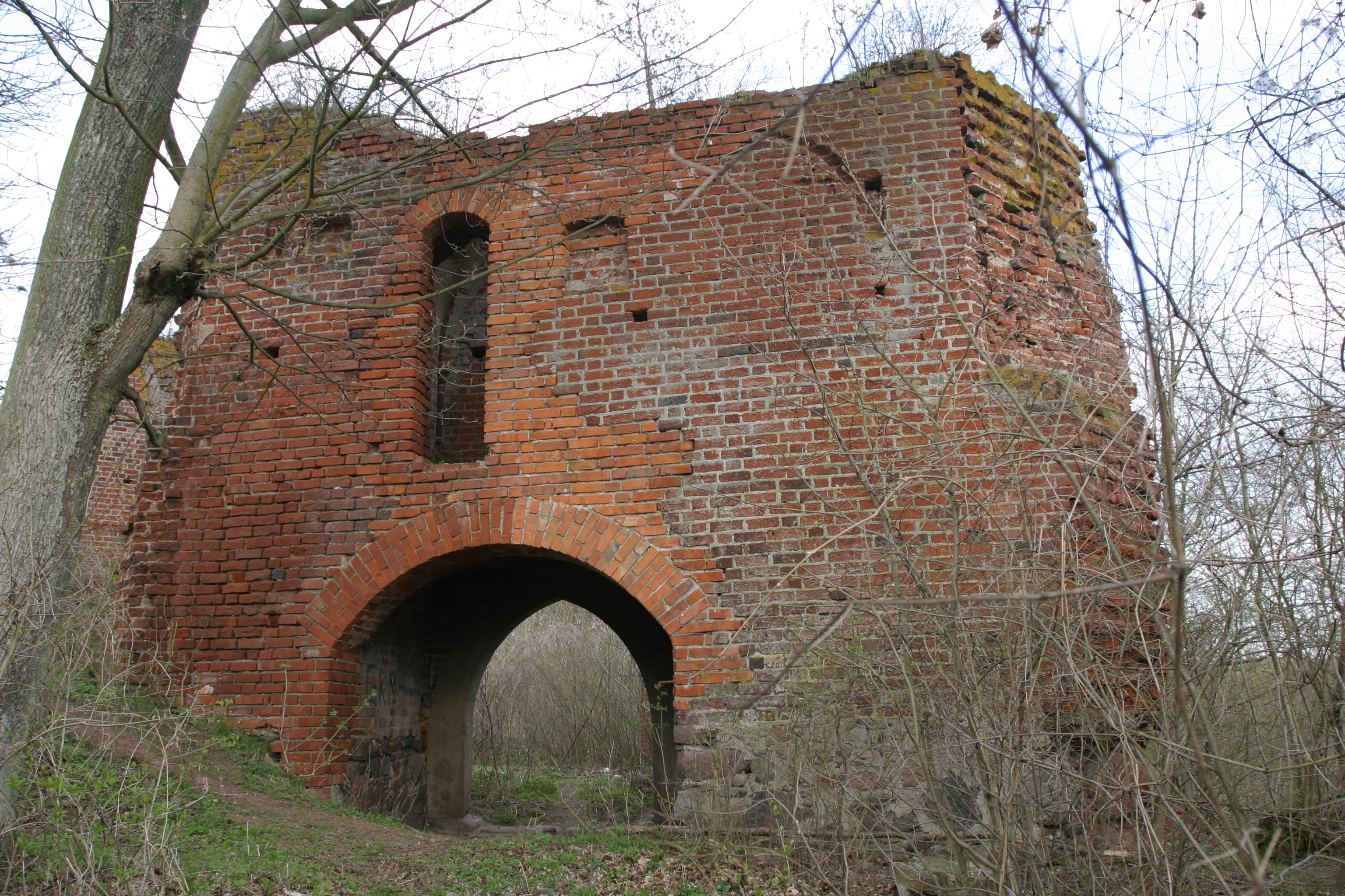 Pokrzywno, ruiny zamku, 1240-1250, 1657, 1784